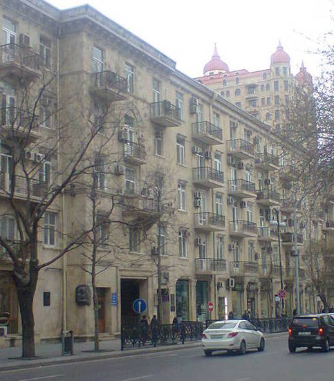 Дом где жили Зейнал Халил, Сулейман Алескеров и другие